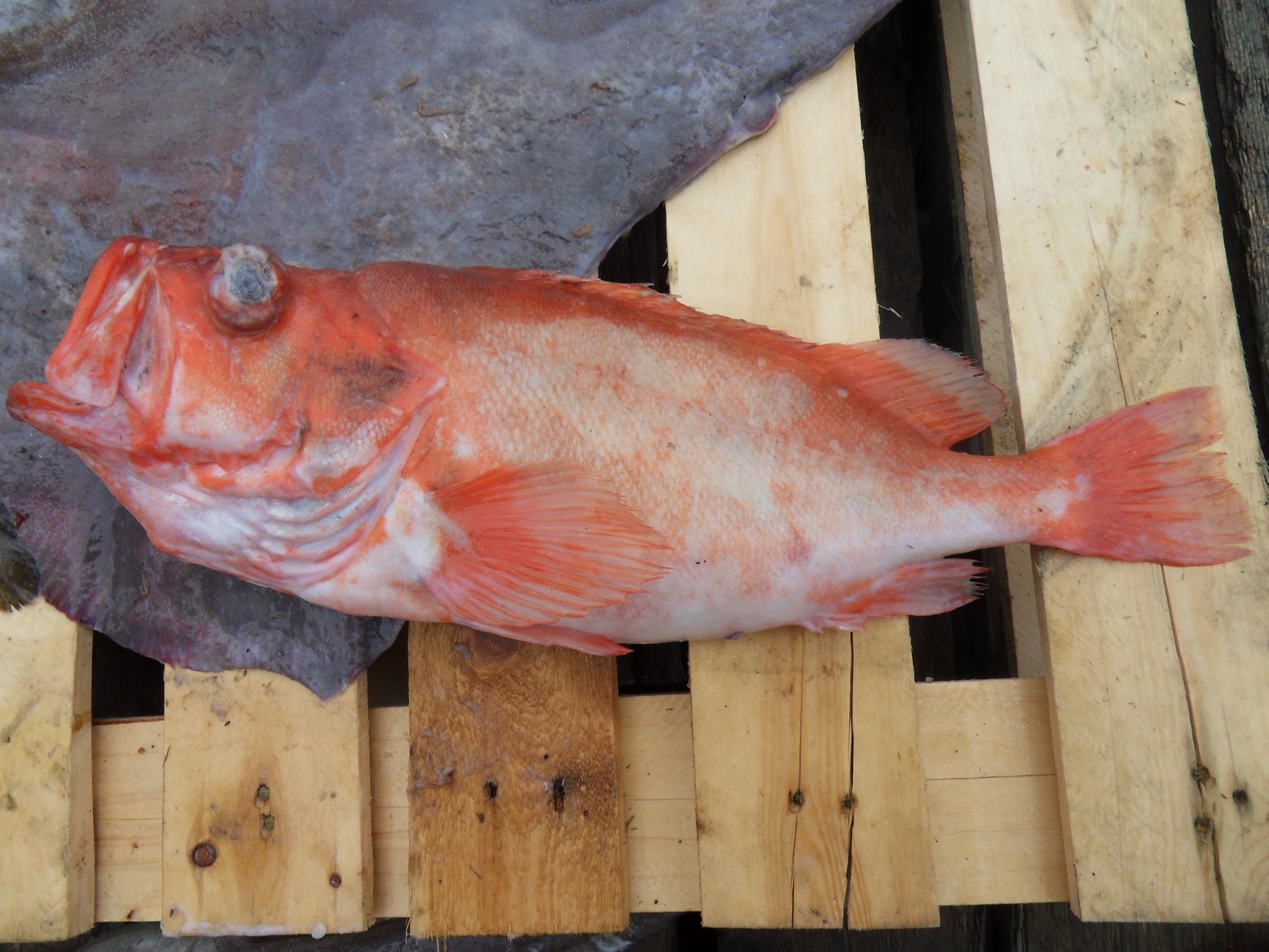 Uer (Sebastes marinus)